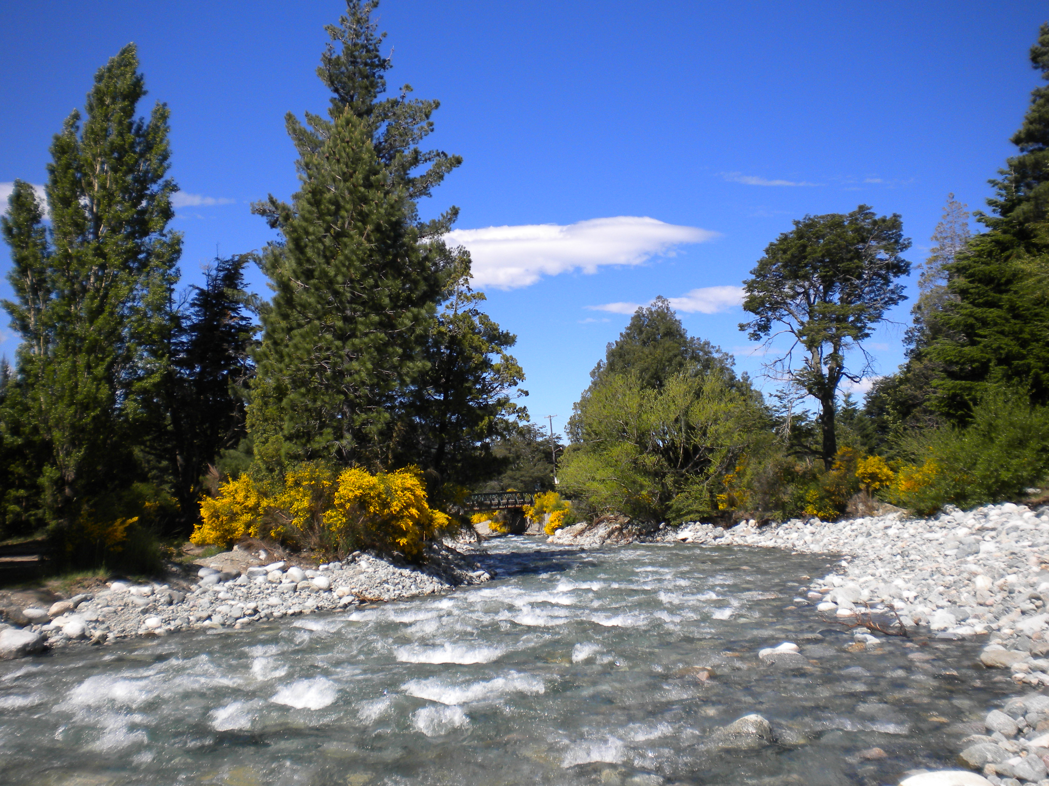 Vista del Arroyo Goye en Colonia Suiza (Río Negro, Argentina).